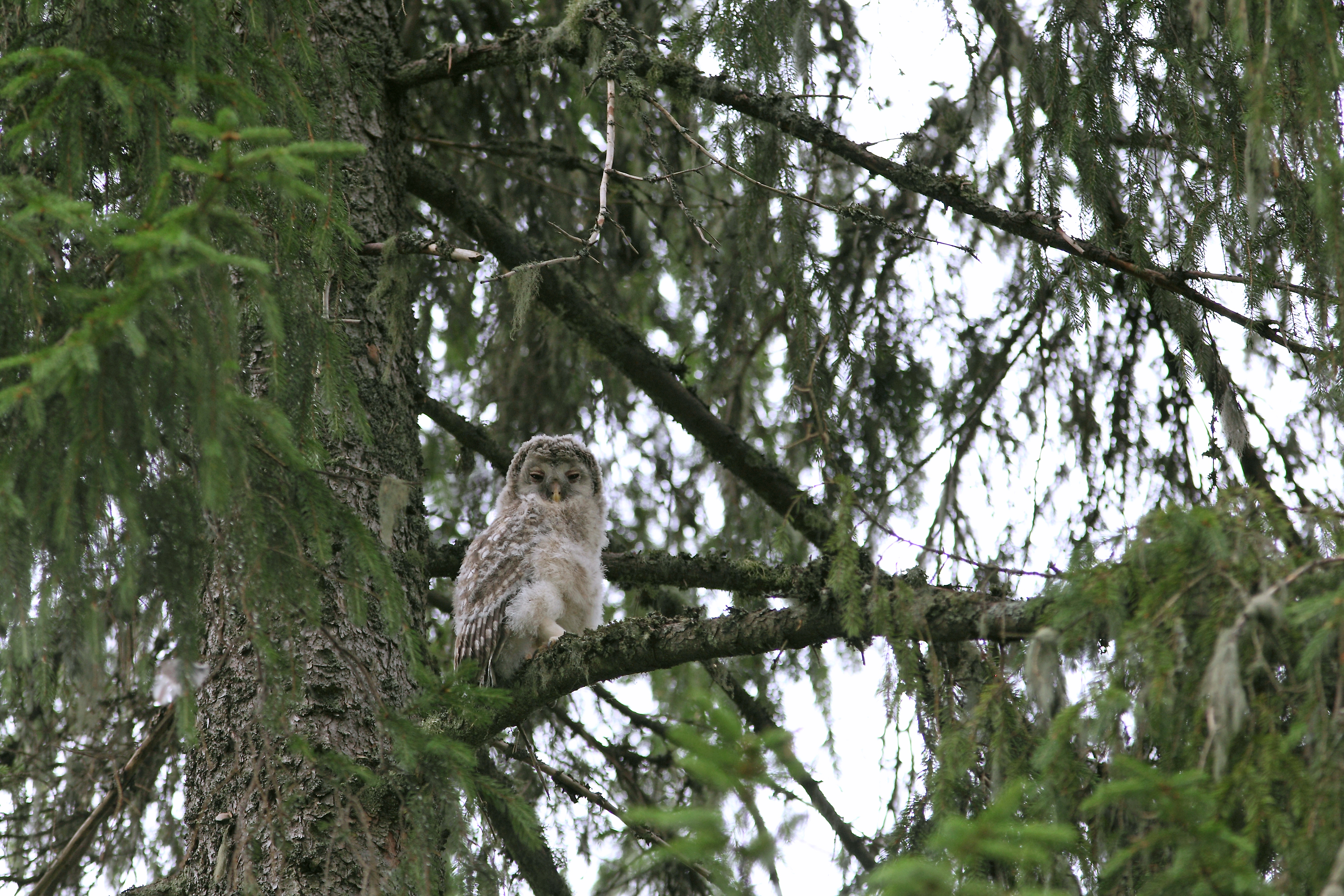 Händkakupoeg Lehtmetsa külas Albu vallas 24.06.2013